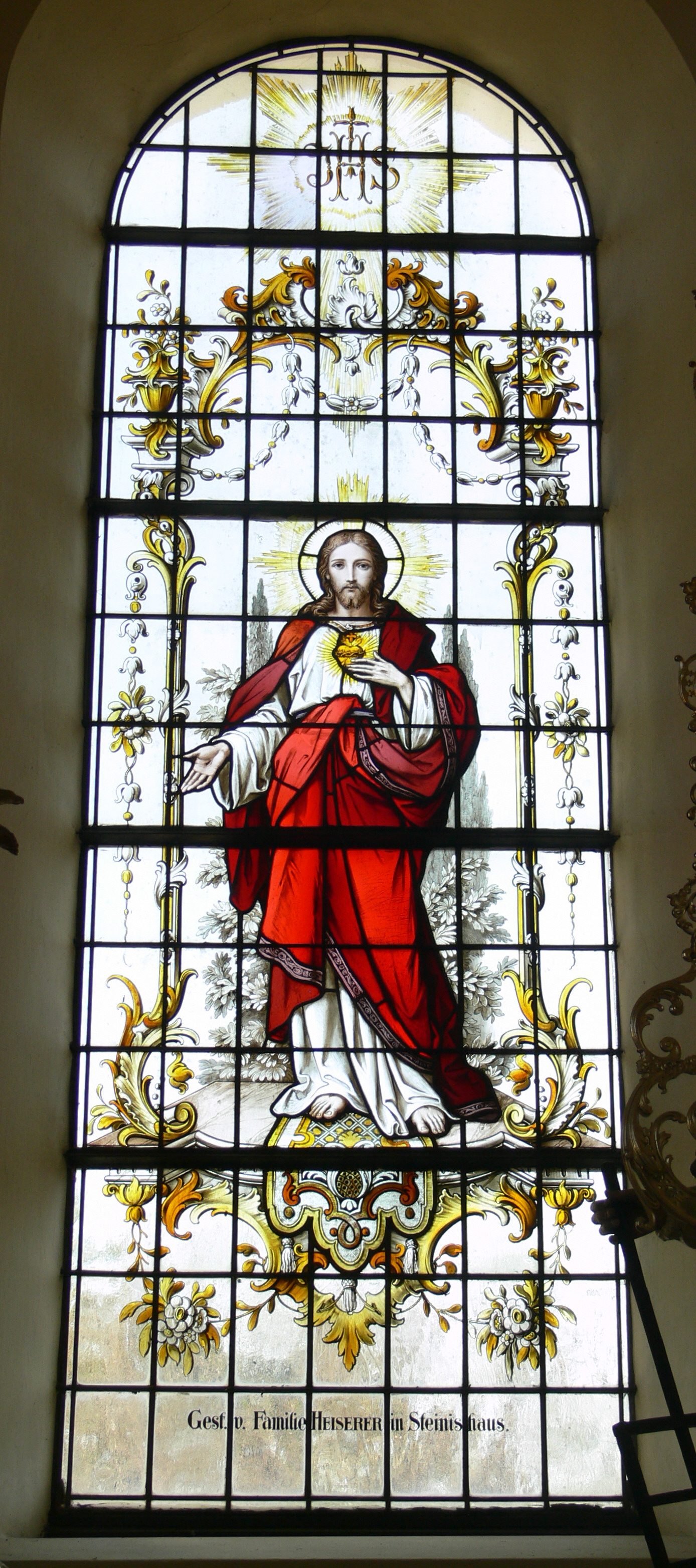 Pfarrkirche St. Konrad und Vinzenz, Fronhofen, Gemeinde Fronreute, Landkreis Ravensburg Herz-Jesu-Fenster